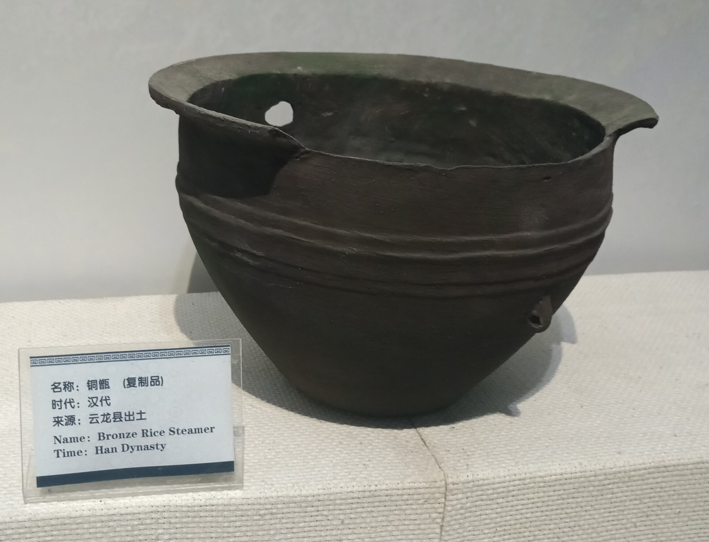 中文（中国大陆）: 大理州博物馆-汉代-云龙县-铜甑